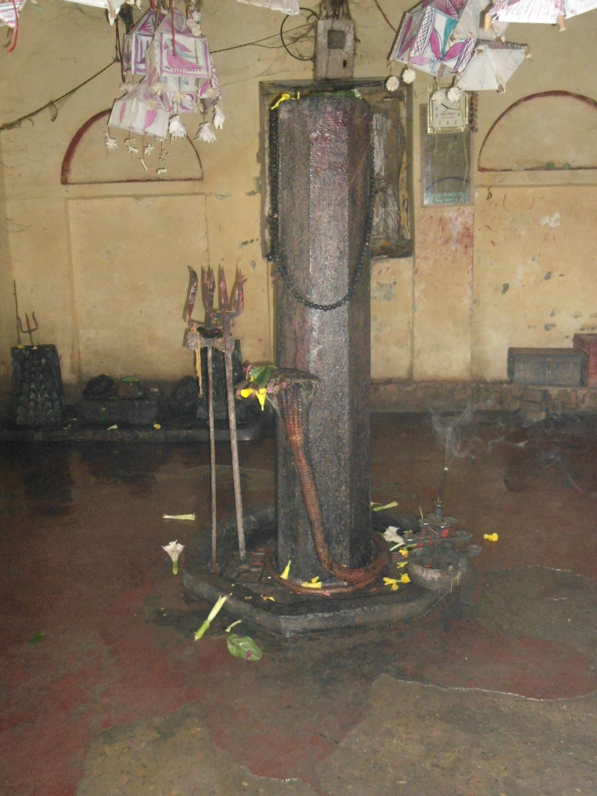 Sambhunath Temple,Saptari